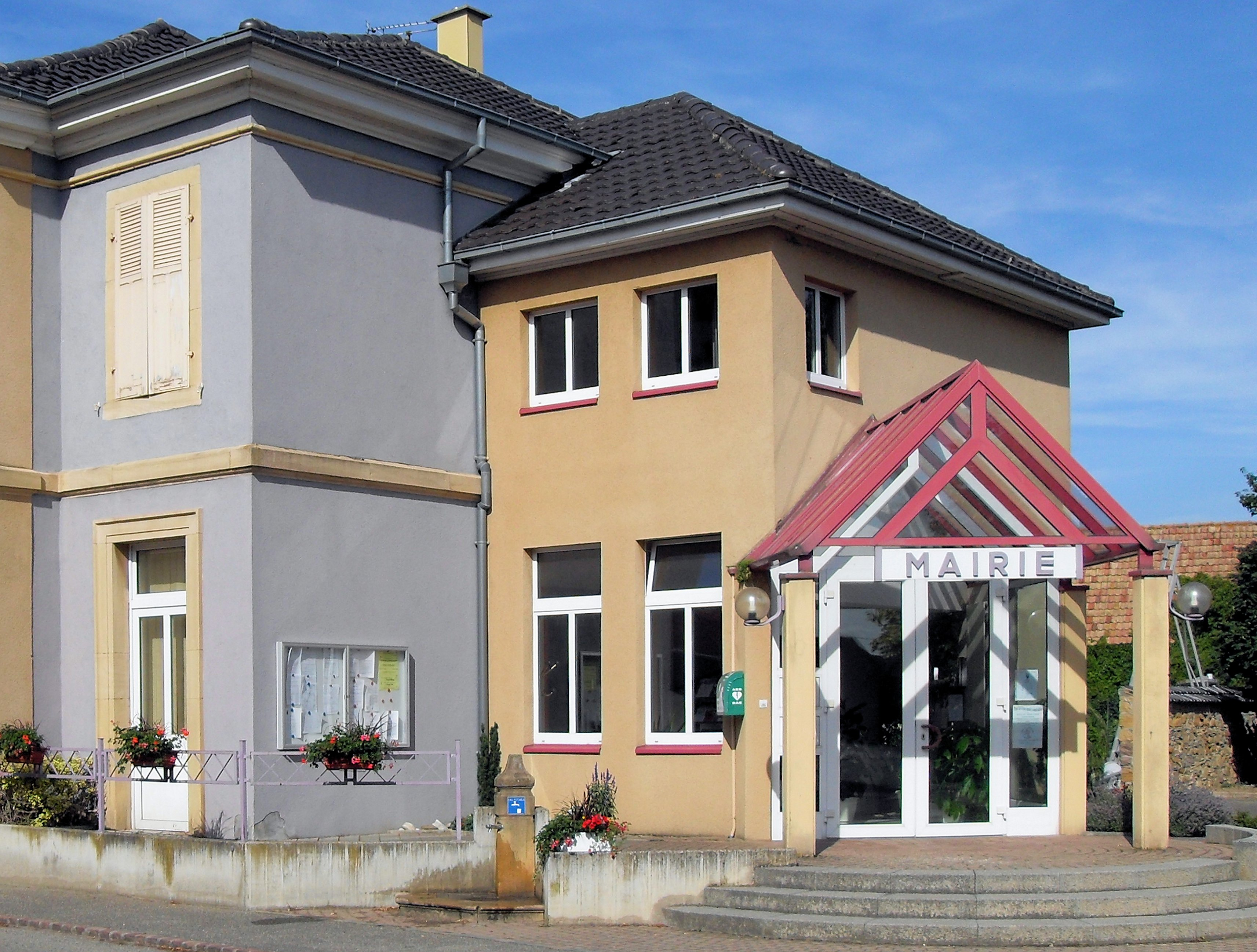 La mairie d'Oberentzen